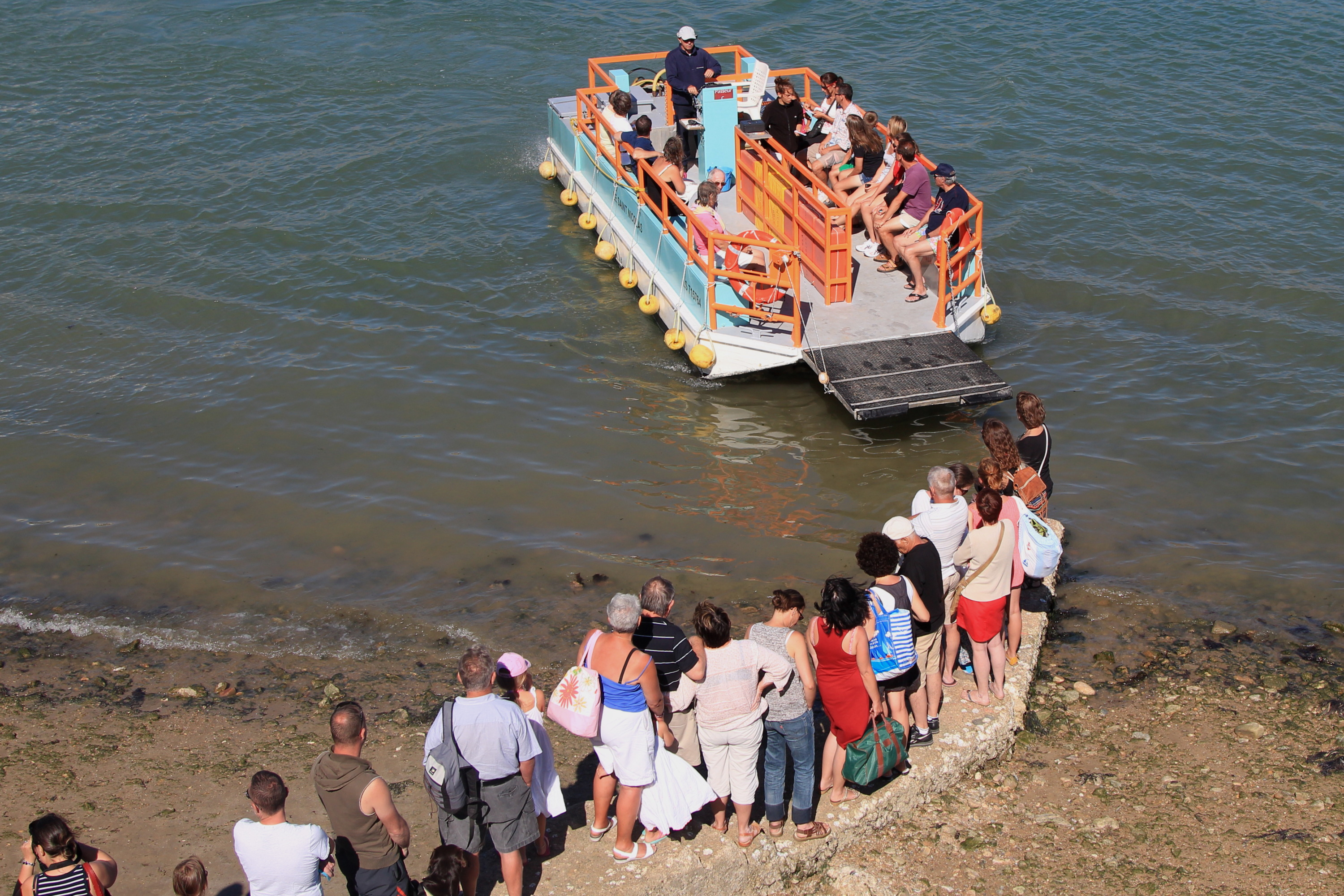 Accostage du passeur de la ligne C côté grande jetée, aux Sables-d'Olonne.